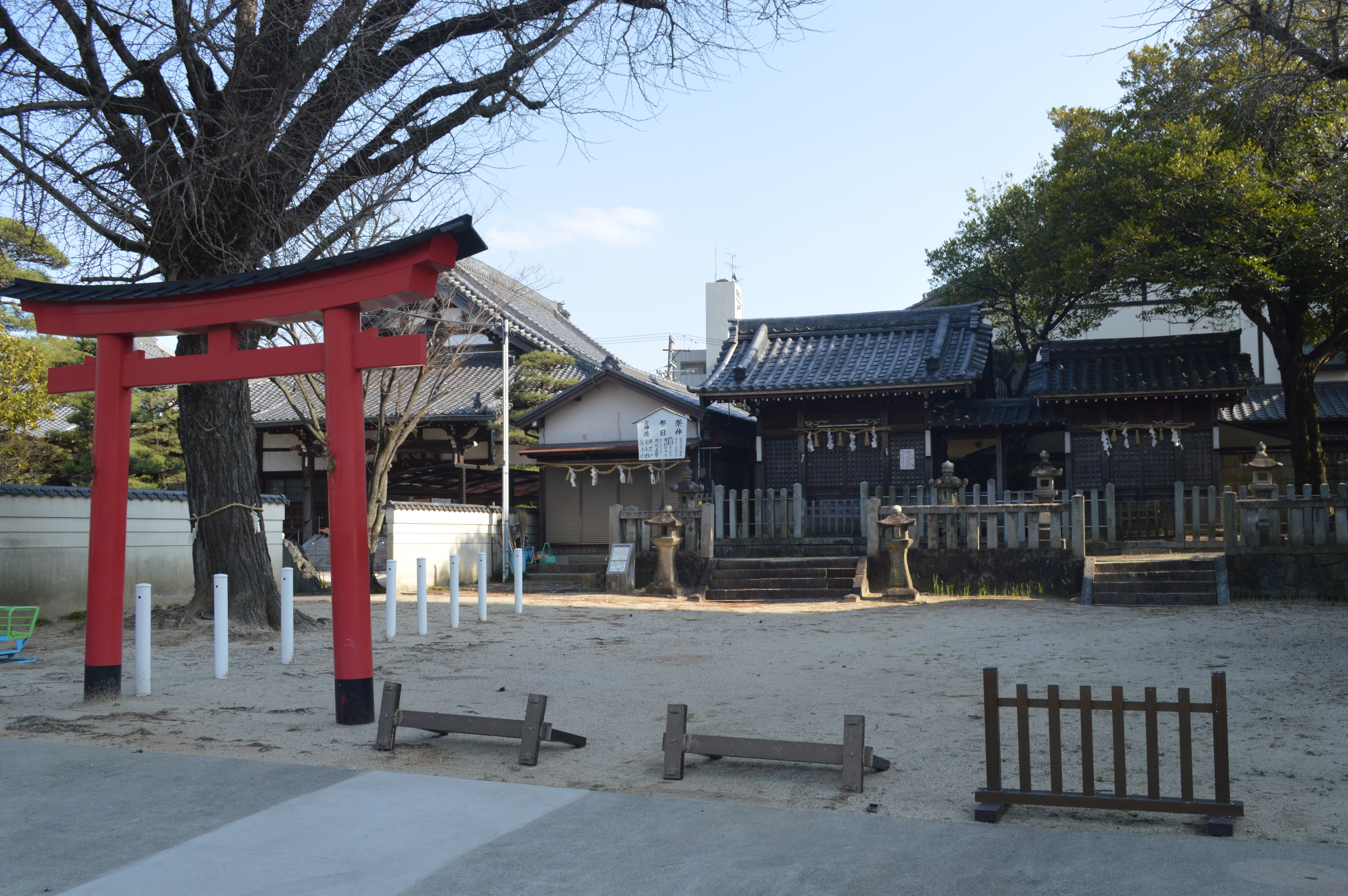 愛知県刈谷市銀座2丁目100の松秀寺の境内にある秋葉神社。